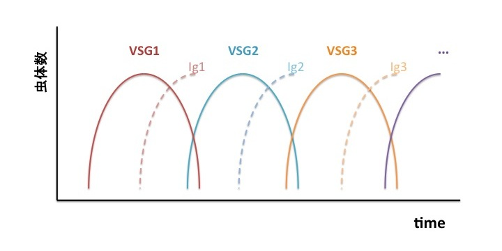 抗体によりトリパノソーマは排除されるが、完全に排除される前に一部の虫体において、虫体表面のVSGが変化する。変化したVSGに以前の抗体は結合できないため、VSGを変化させたトリパノソーマが宿主体内で増殖する。これを繰り返すことで免疫回避が成立する。